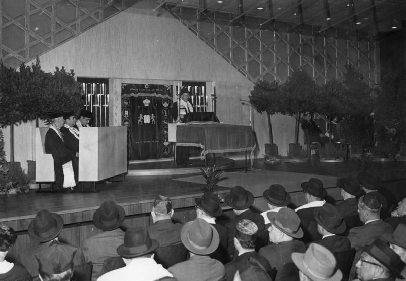 1.10.1959 West-Berlin: Einweihung des neuen jüdischen Gemeindehauses in der Fasanenstr.